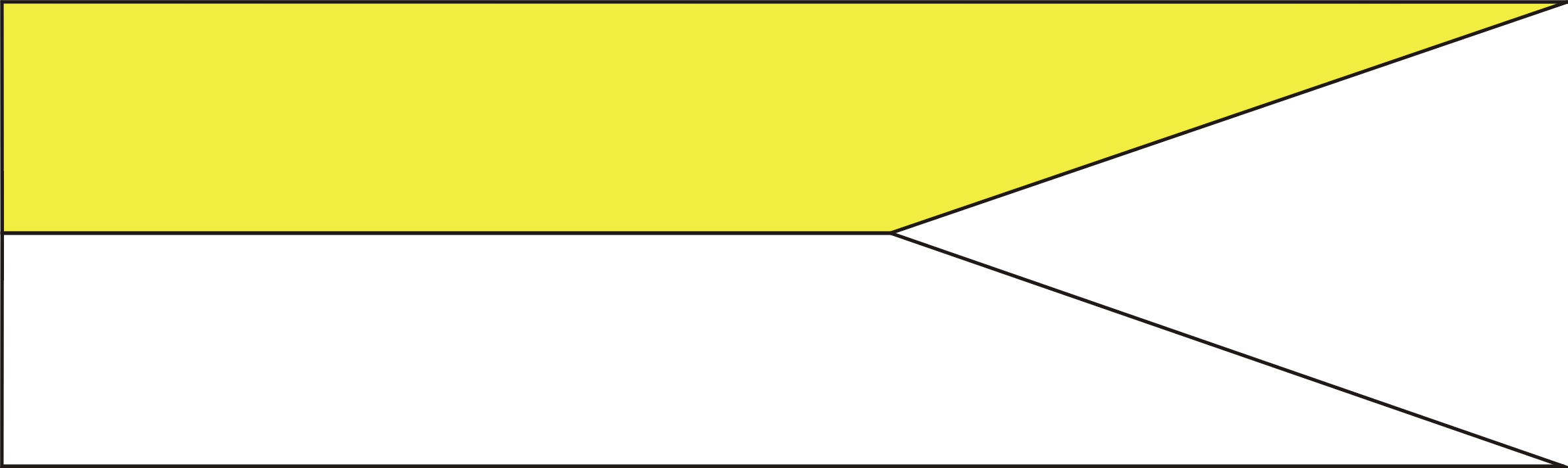 Barwy - proporczyk 3 Pułku Ułanów Śląskich